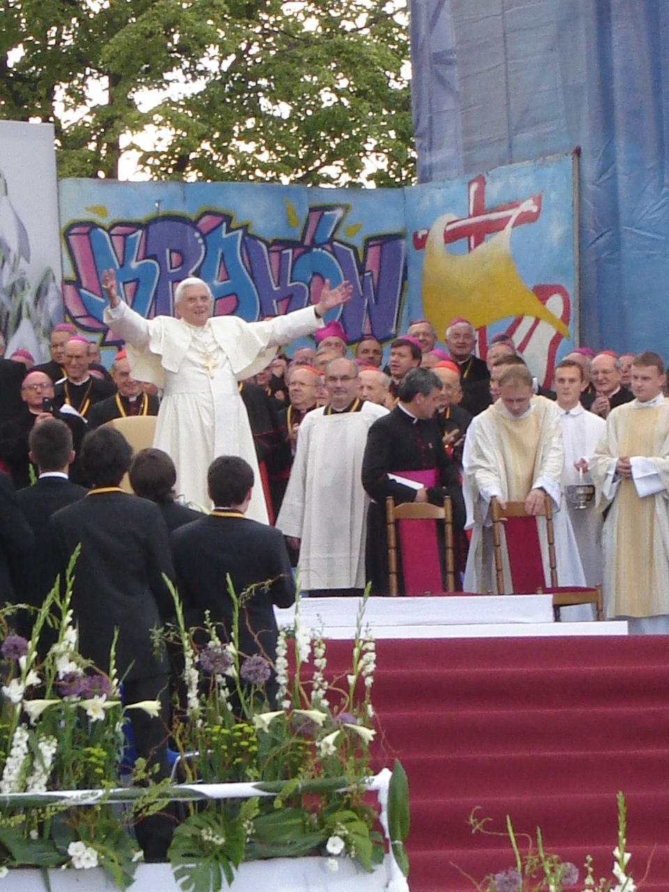 Benedykt XVI na Błoniach w Krakowie. Spotkanie z młodymi.